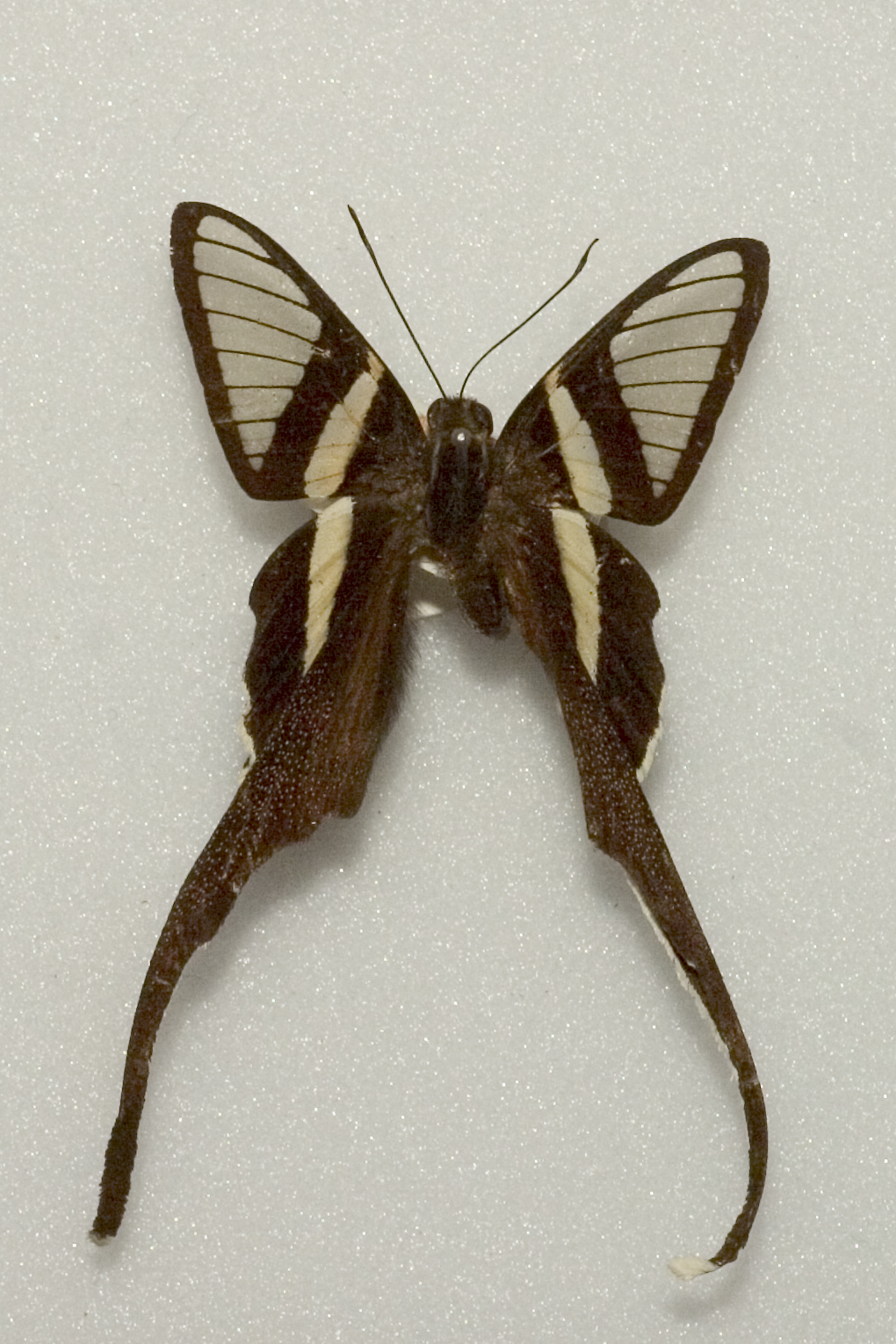 Lamproptera meges